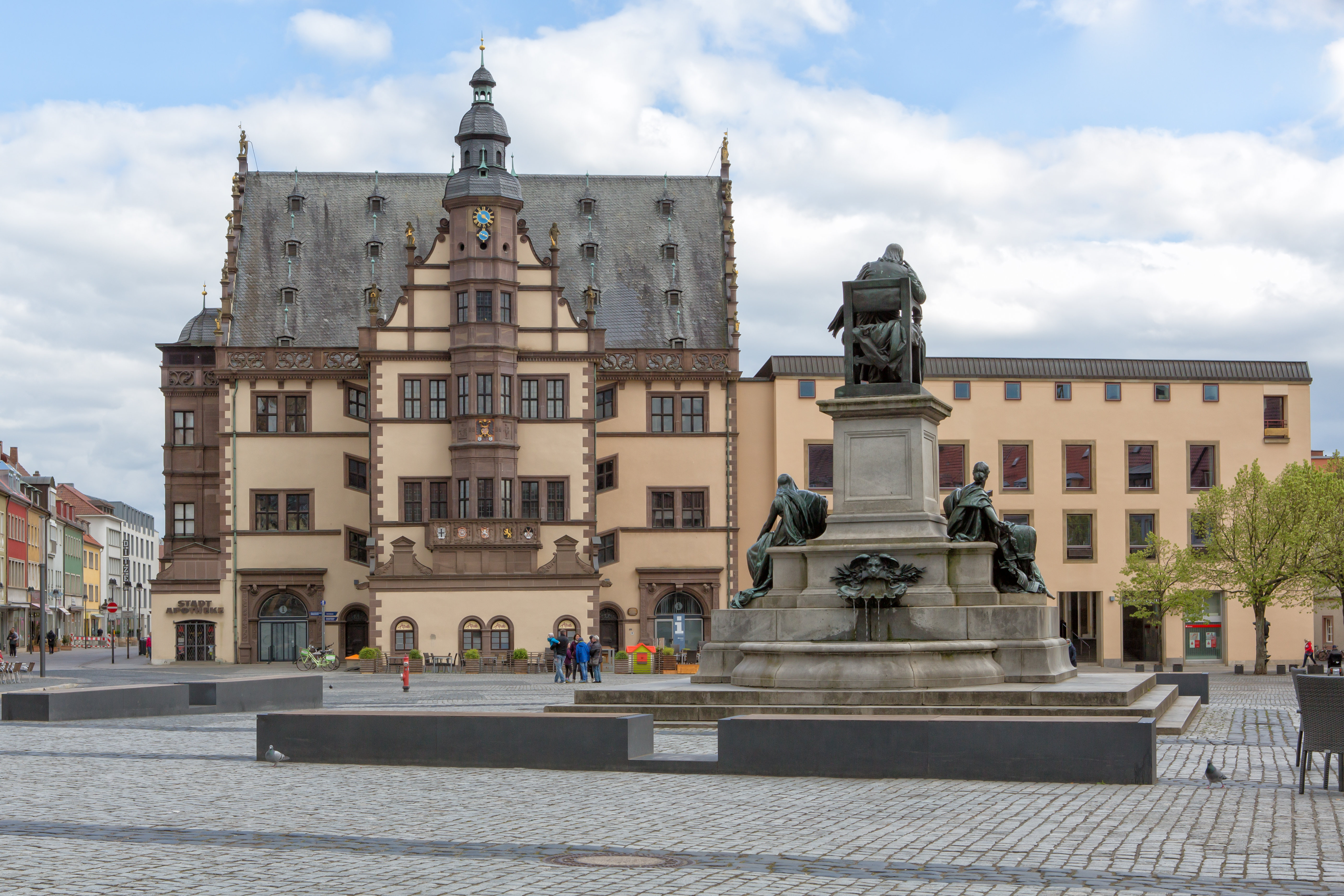 Blick über den Marktplatz auf das Rathaus Schweinfurt und das Rückert-Denkmal.